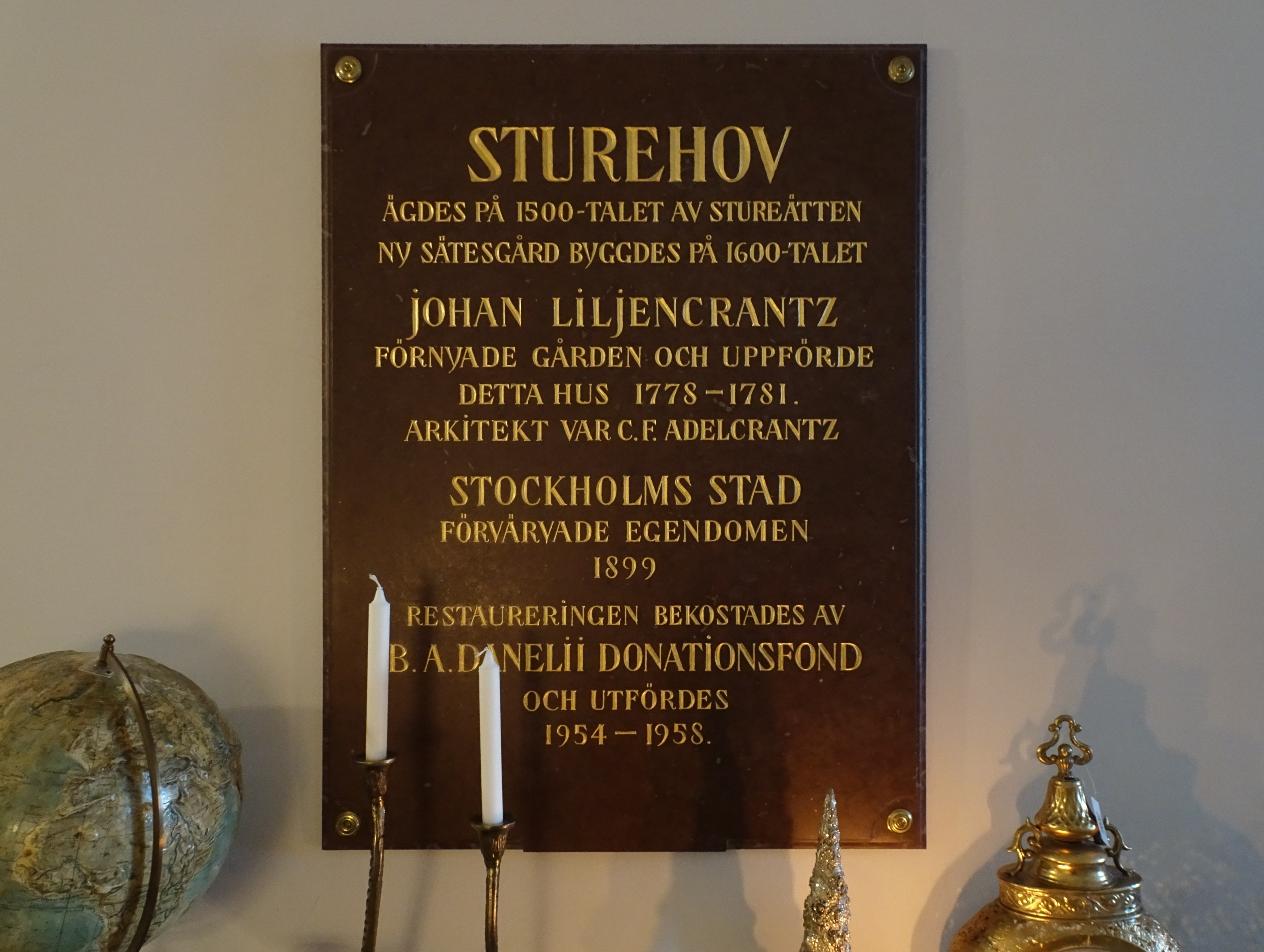 Sturehov minnestavla